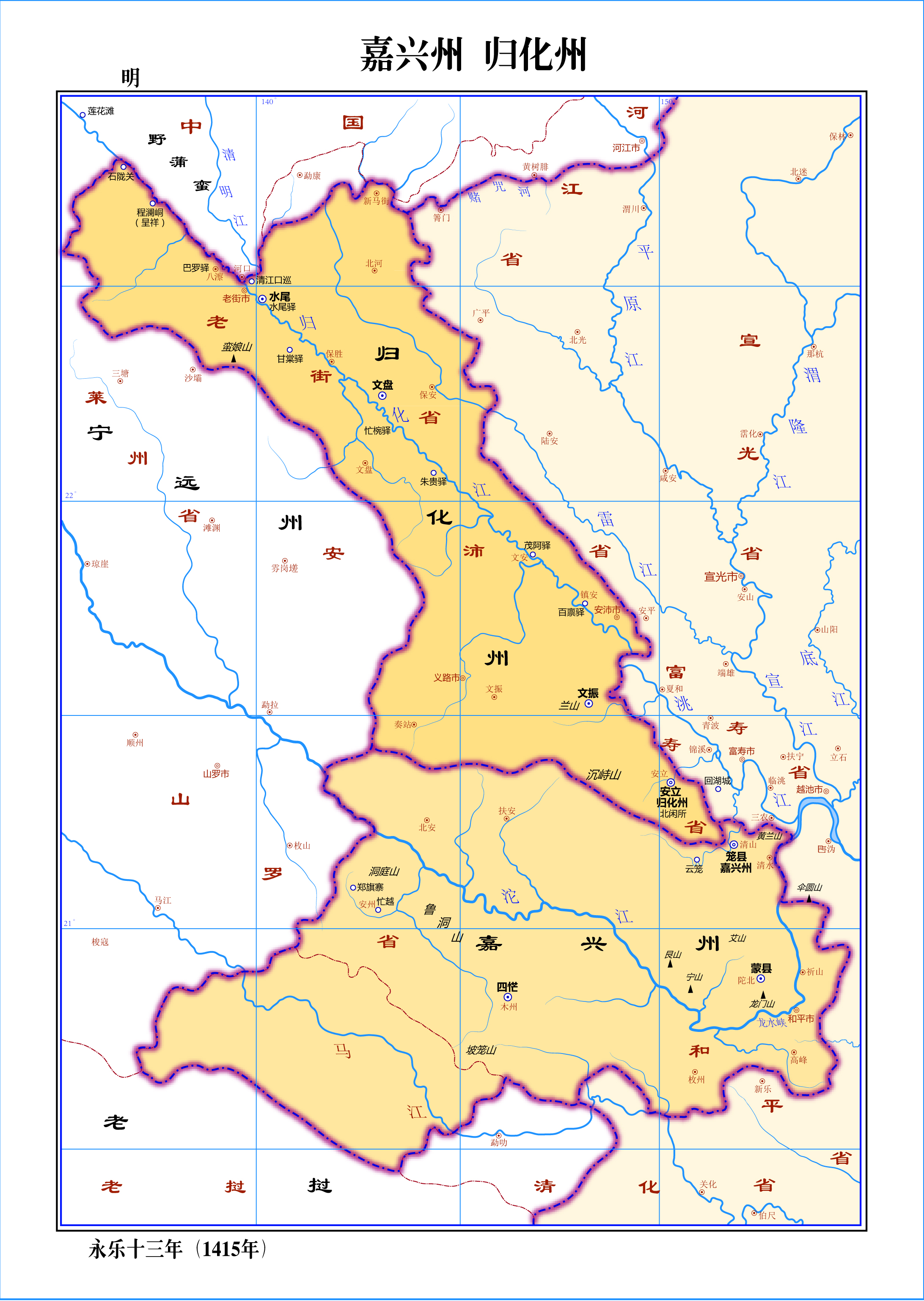 明代交阯承宣布政使司嘉興直隸州及歸化直隸州